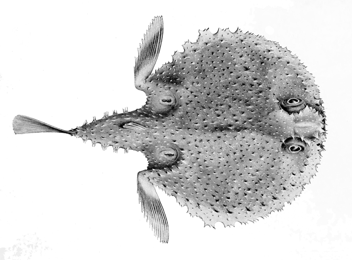 Halieutaea brevicauda